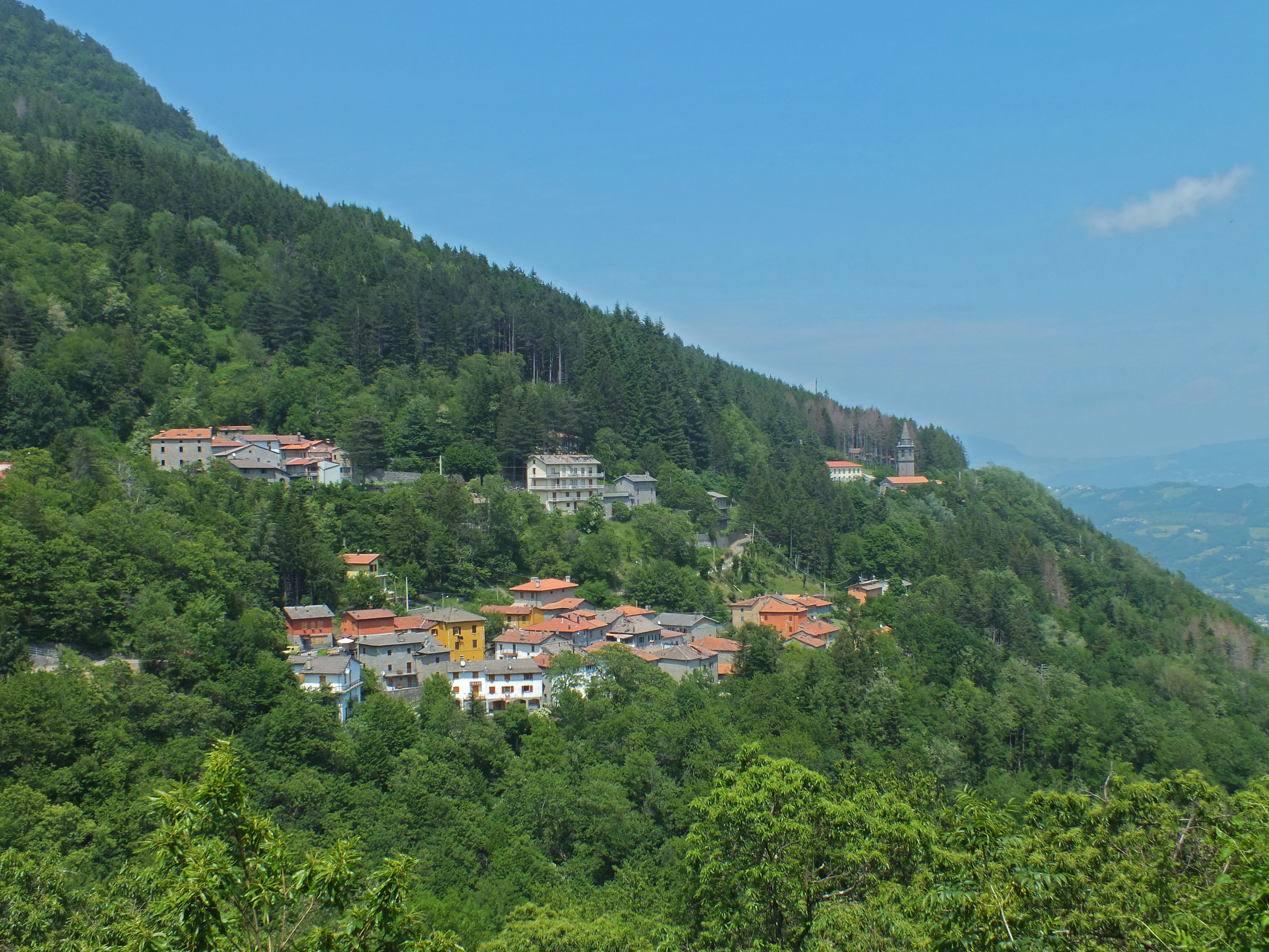 Panorama di Granaglione